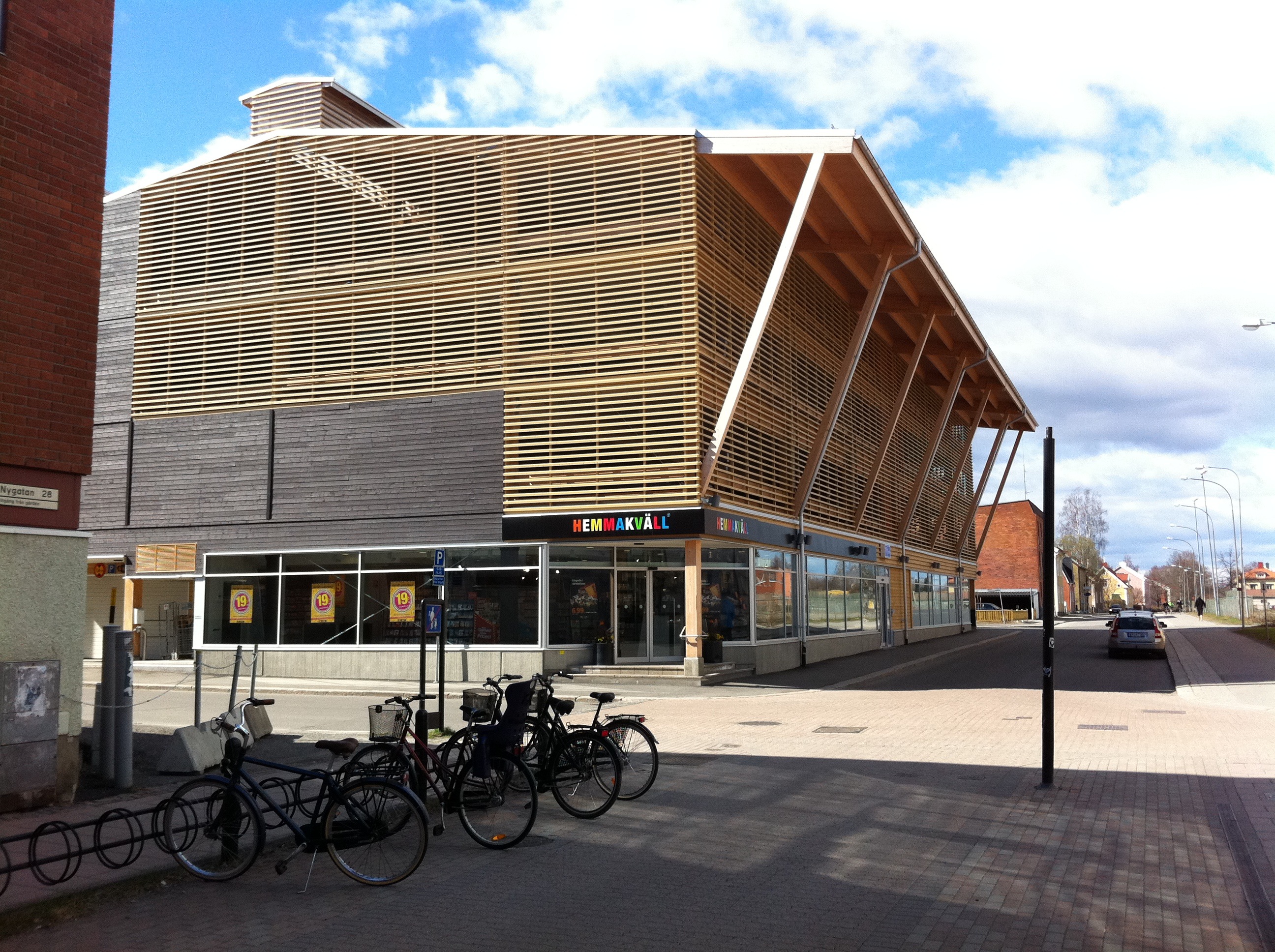 I kvarteret Ekorren ligger ett modernt flerbostadshus med tillhörande parkeringshus ritat av Magnus Silfverhjelm och AIX arkitekter. Husen uppfördes 2006-08. Husen på fem våningar i norr trappas ner till två våningar i söder. En gårdsmiljö bildas tillsammans med de omgivande äldre husen. Parkeringshuset uppfördes i massiv- och limträ av Martinsons Trä, också ritat av AIX.